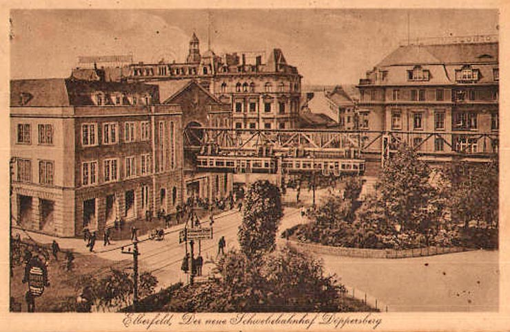 Ansichtskarte des neuen Schwebebahnhofs Döppersberg und des Köbo-Hauses in Elberfeld auf einer Postkarte von 1926